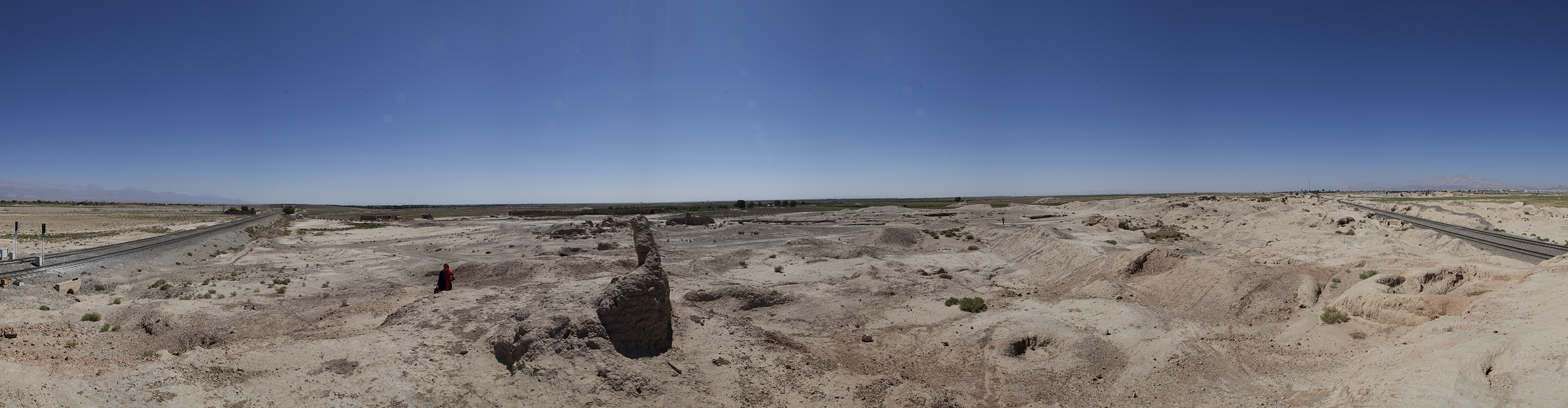 تپه‌حصار